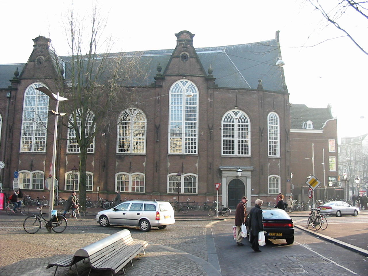 Oude Lutherse Kerk, Singel 411, Amsterdam, The Netherlands.